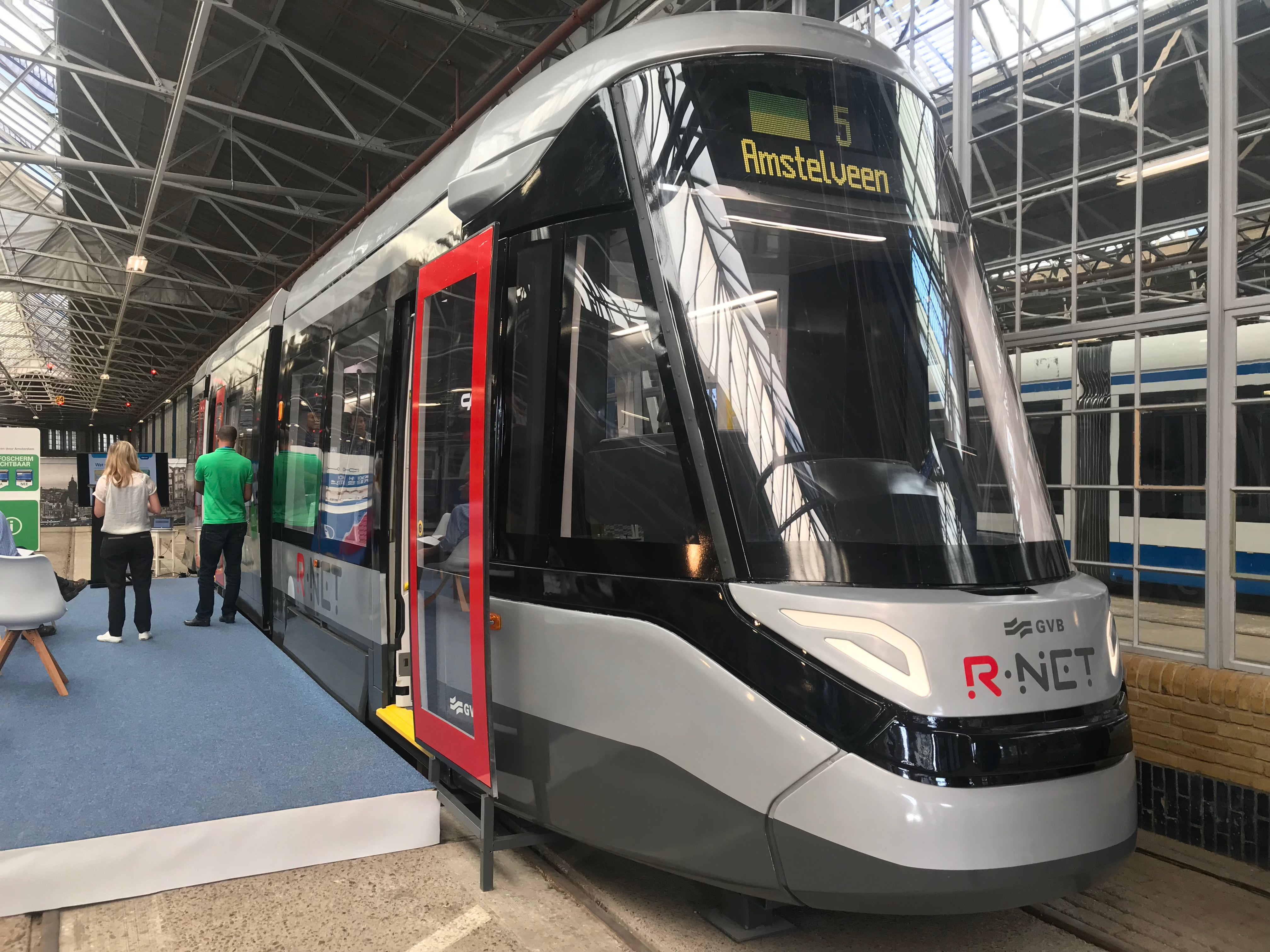 Voorkant van de mock-up van de 15G in de remise Lekstraat.